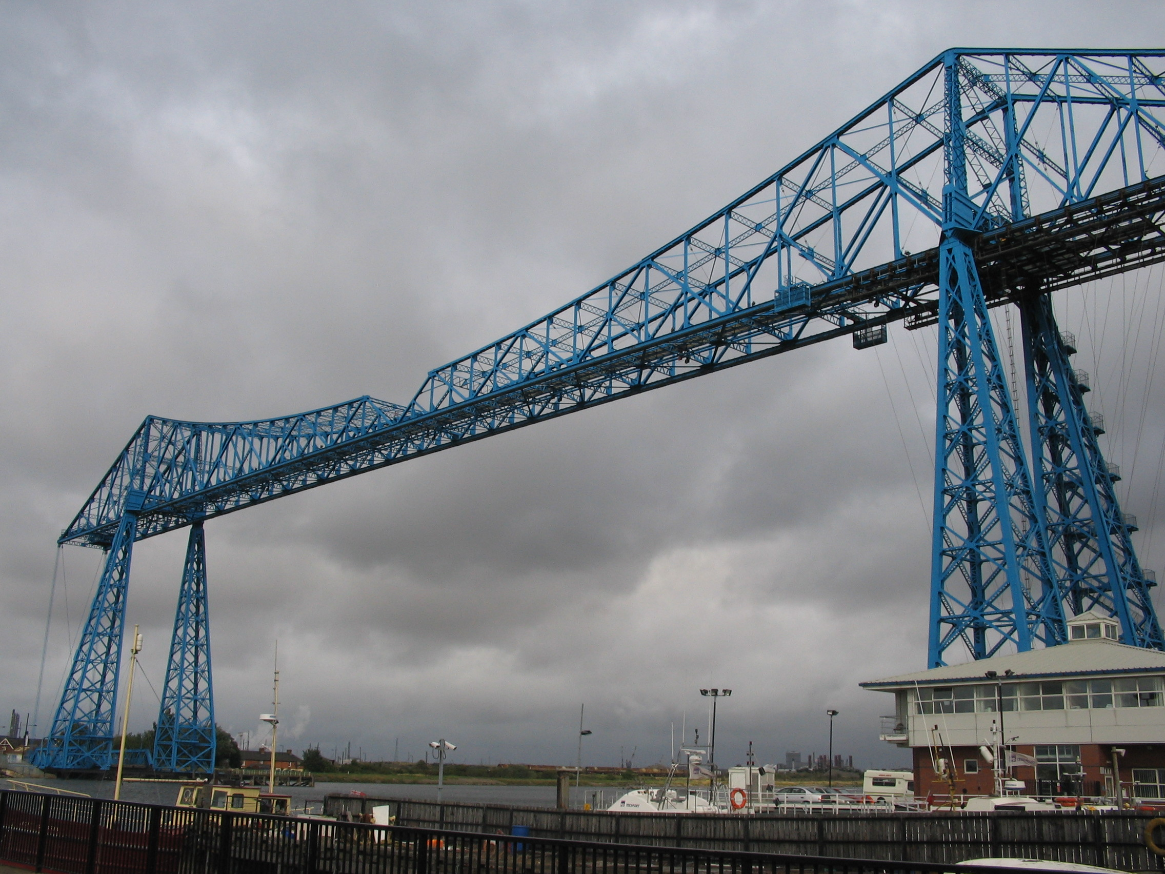 Transportbrug Middlesbrough - eigen foto - augustus 2006